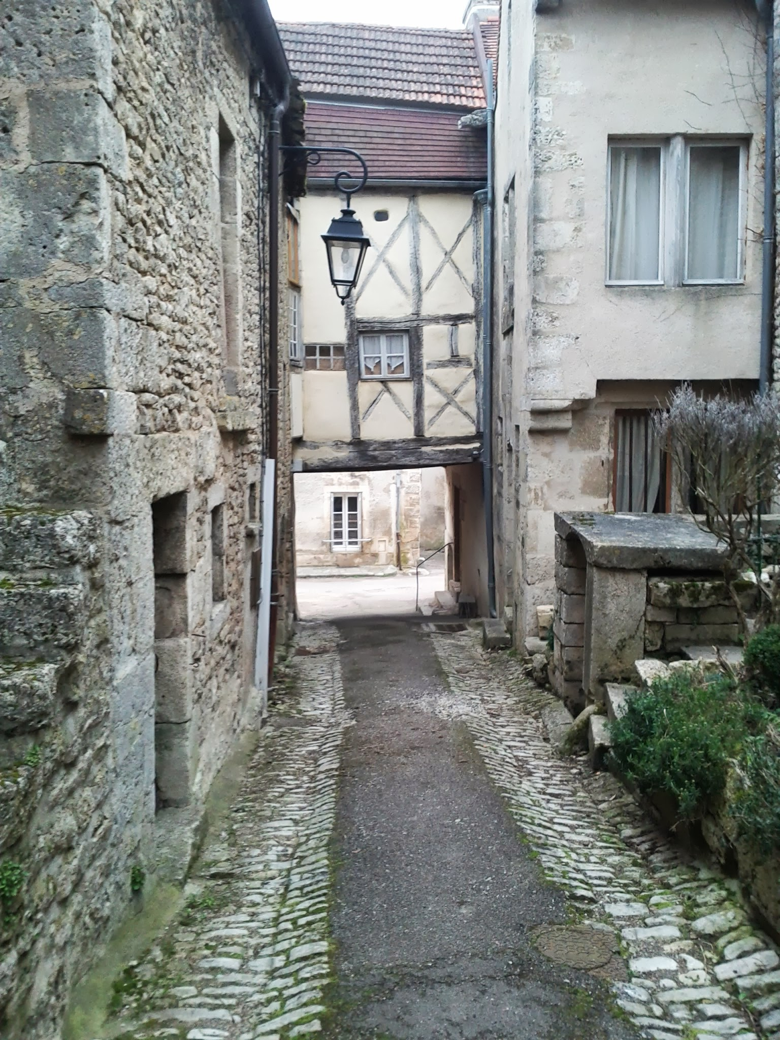 Une ruelle de Flavigny